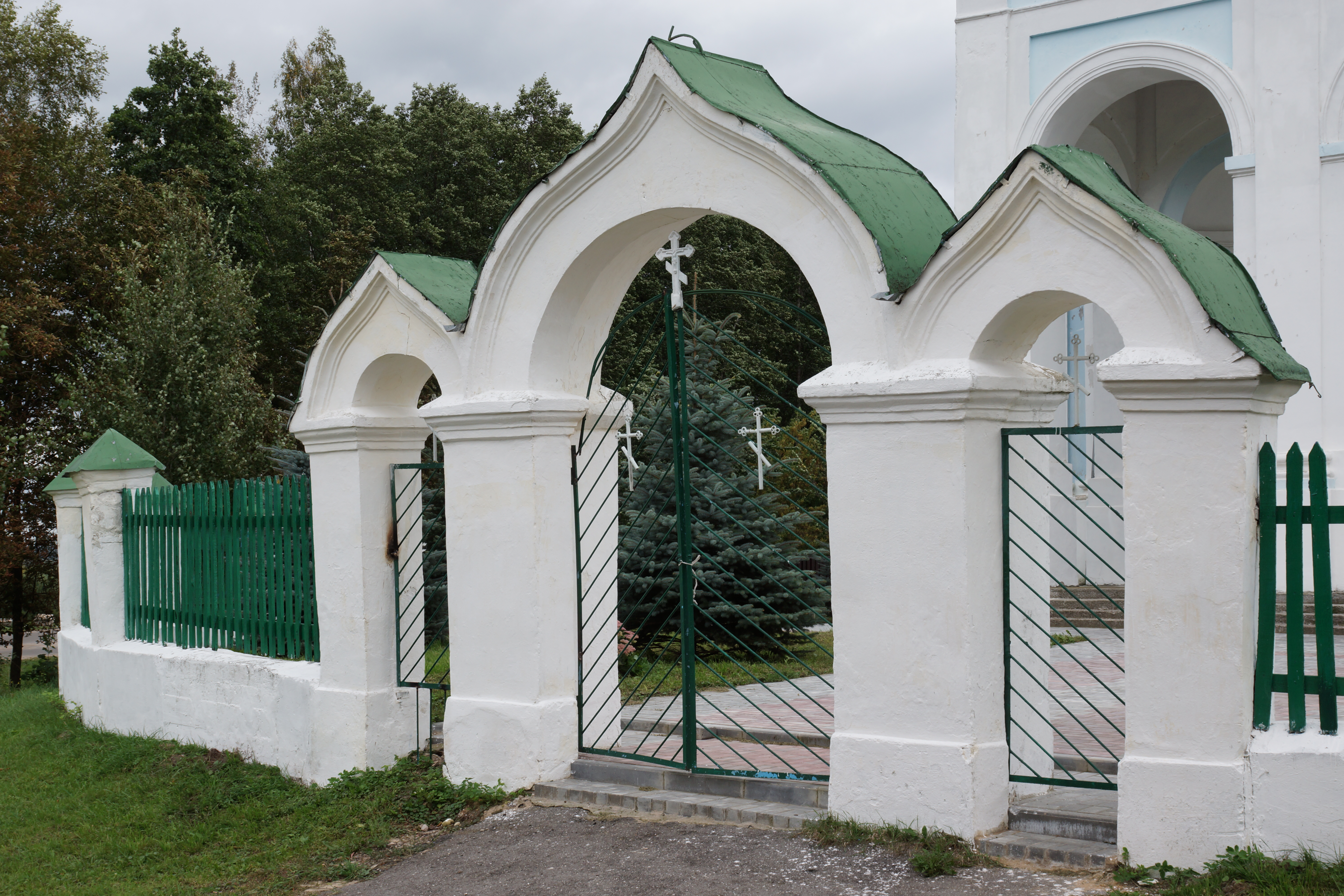 Беларуская (тарашкевіца): Дзьмітрыеўская царква з брамай і домам старасты. в. Шчорсы This is a photo of Belarusian heritage monument. Reference number: 412Г000468 ( WLM)